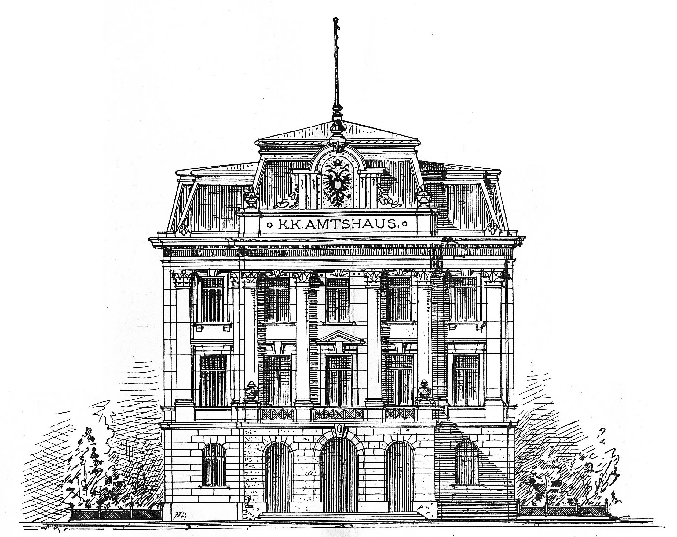 Großgemeinde Floridsdorf, Niederösterreich, k.k. Amtshaus (Bezirkshauptmannschaft, heute: Bezirksgericht Wien-Floridsdorf), baulich eröffnet 1. August 1896; Tätigkeitsbeginn: 1. September 1896